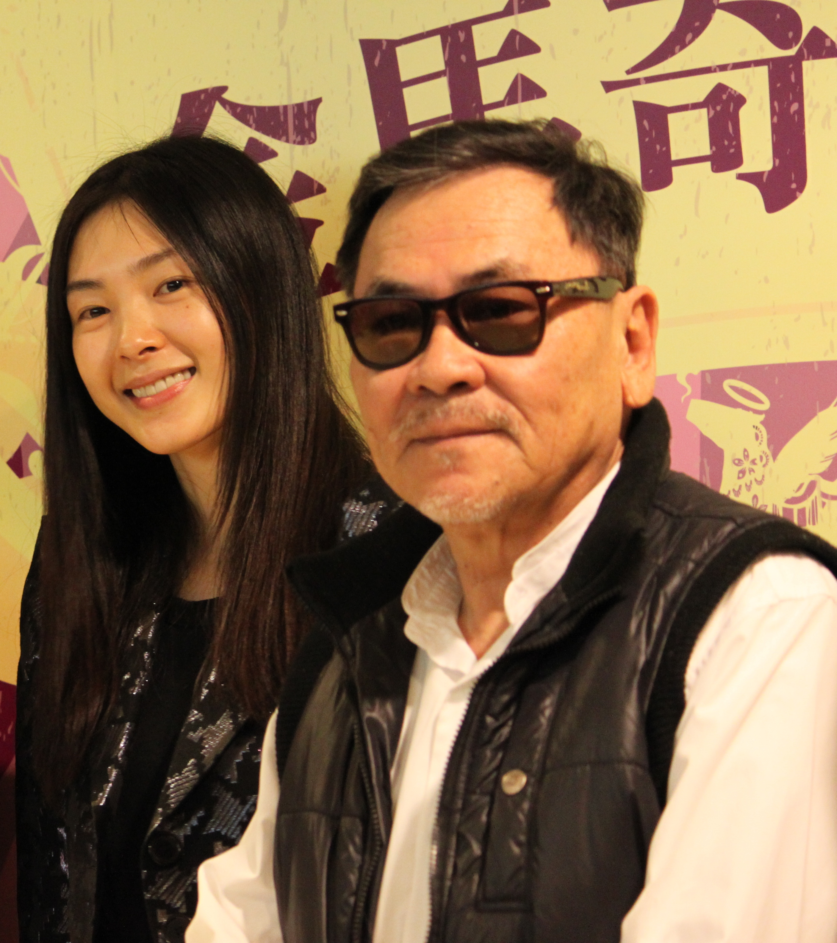 臺灣電影導演王童（右）。